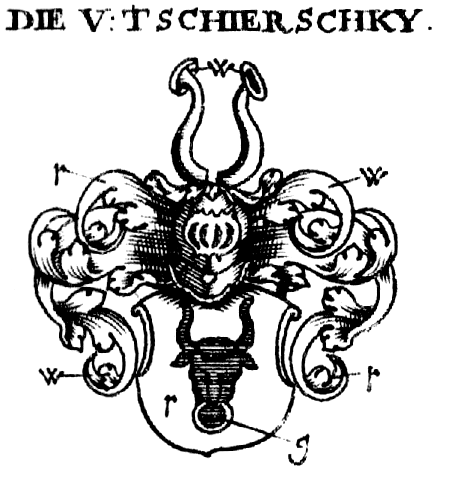 Blason de l famille Von Tschirschky,Tschirsky,Tschierschky